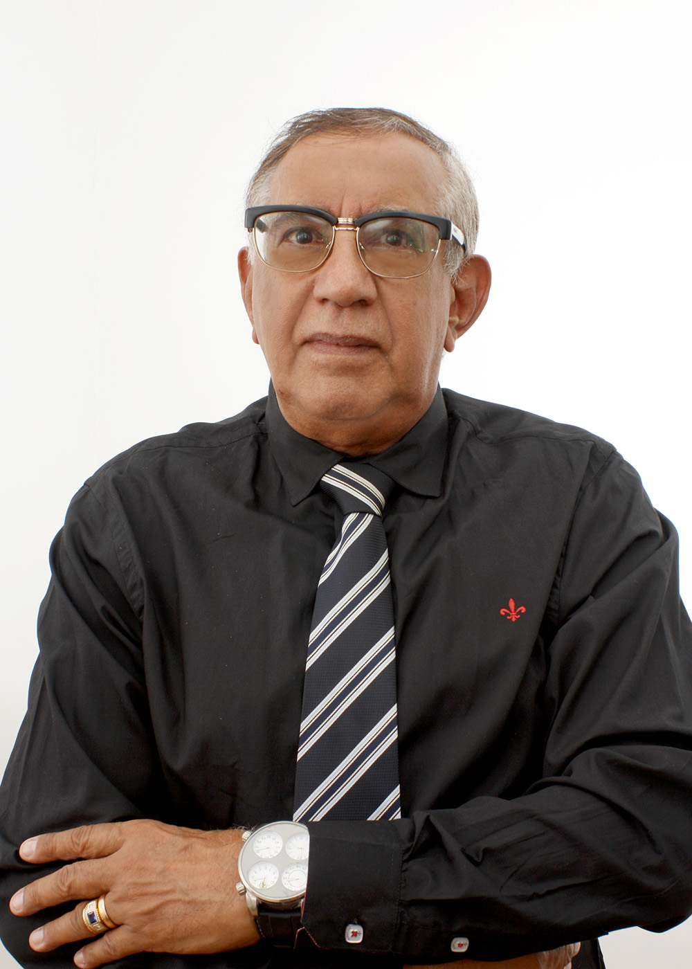 Português do Brasil: Fernando de Castro Velloso